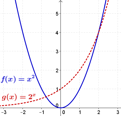 Полиномна функција x^2 и експоненцијална функција 2^x